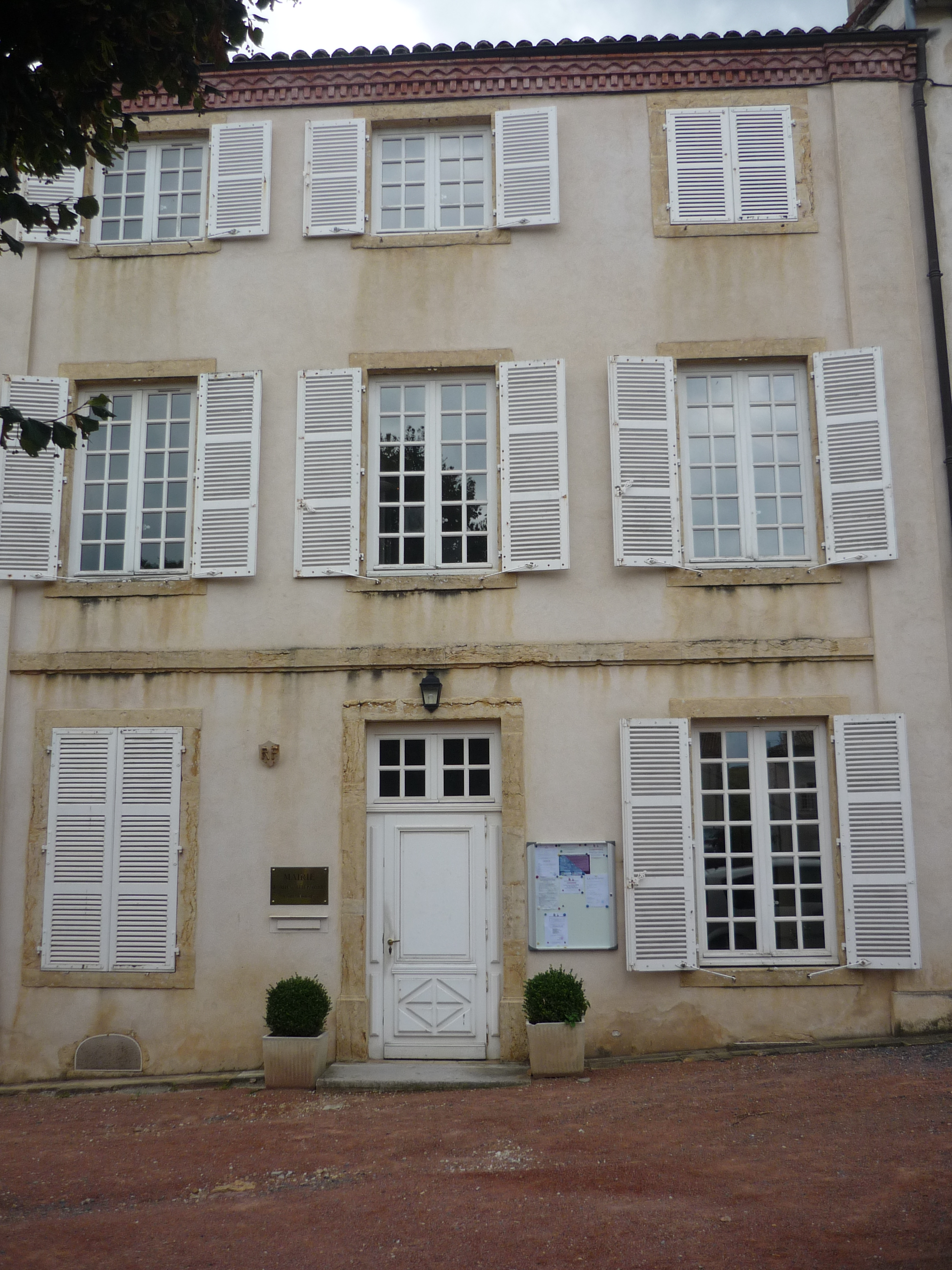 Mairie de la commune de Salles-Arbuissonnas-en-Beaujolais dans le département du Rhône